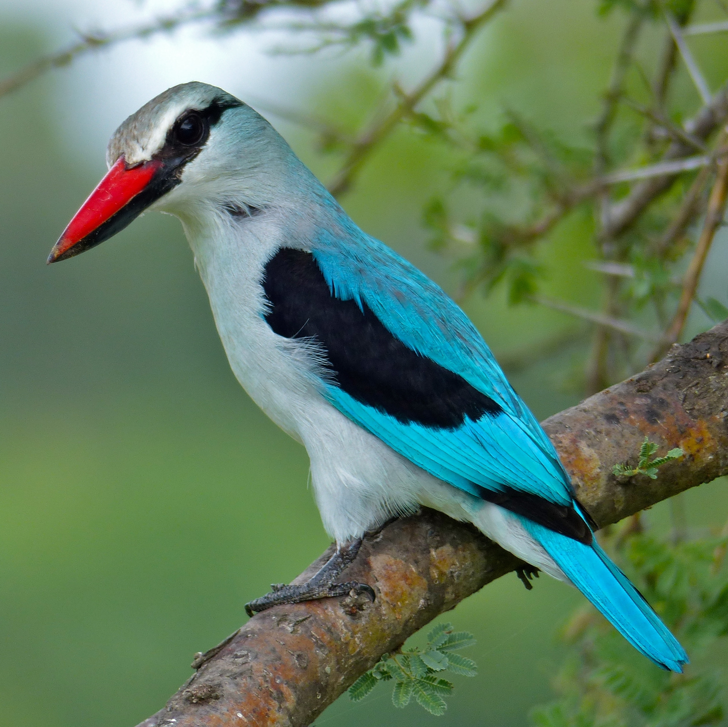 H1-6 Road North of Letaba, Kruger NP, SOUTH AFRICA